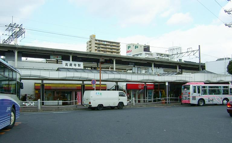 高蔵寺駅